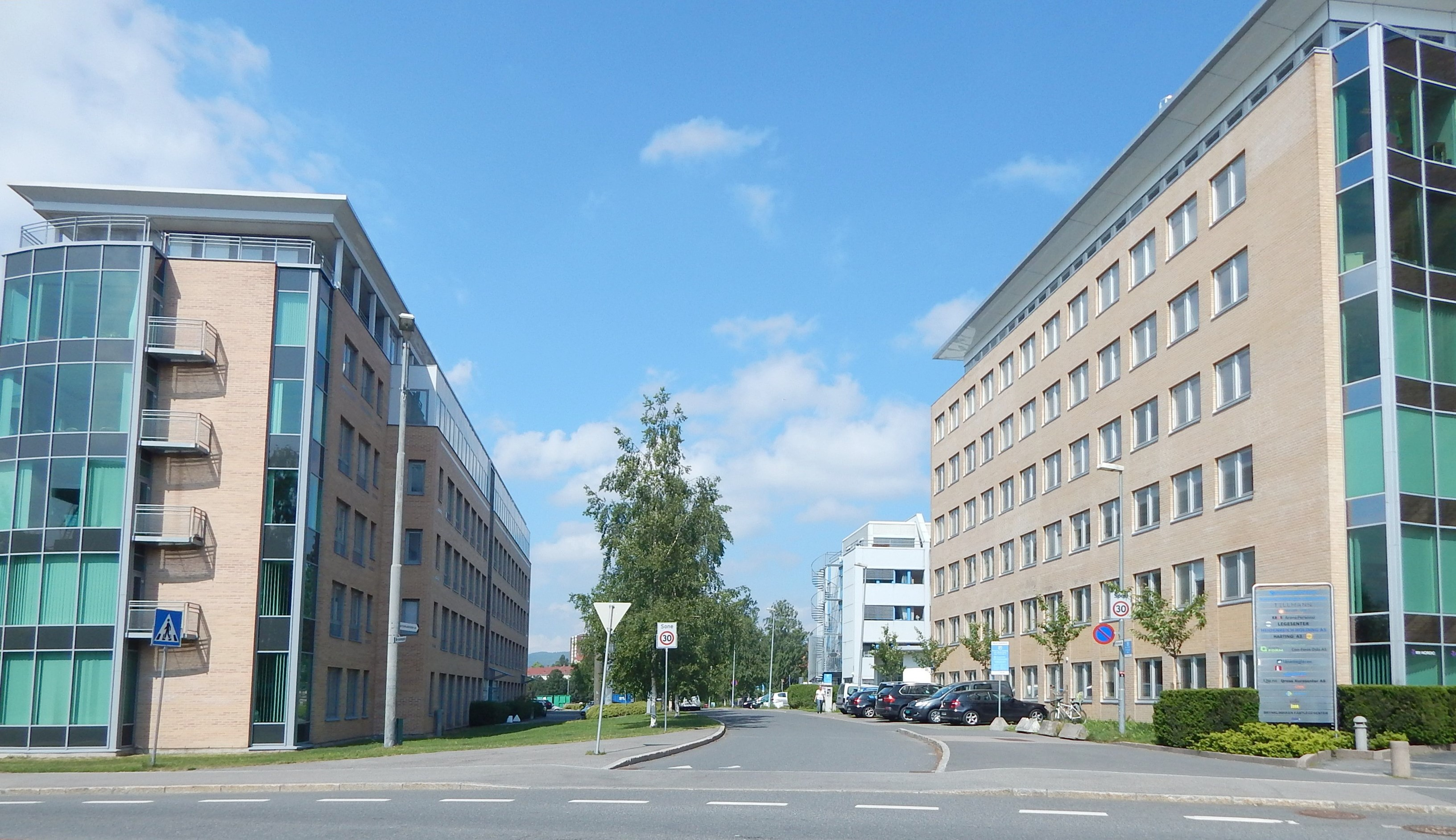 Brynshøgda sett fra Østensjøveien